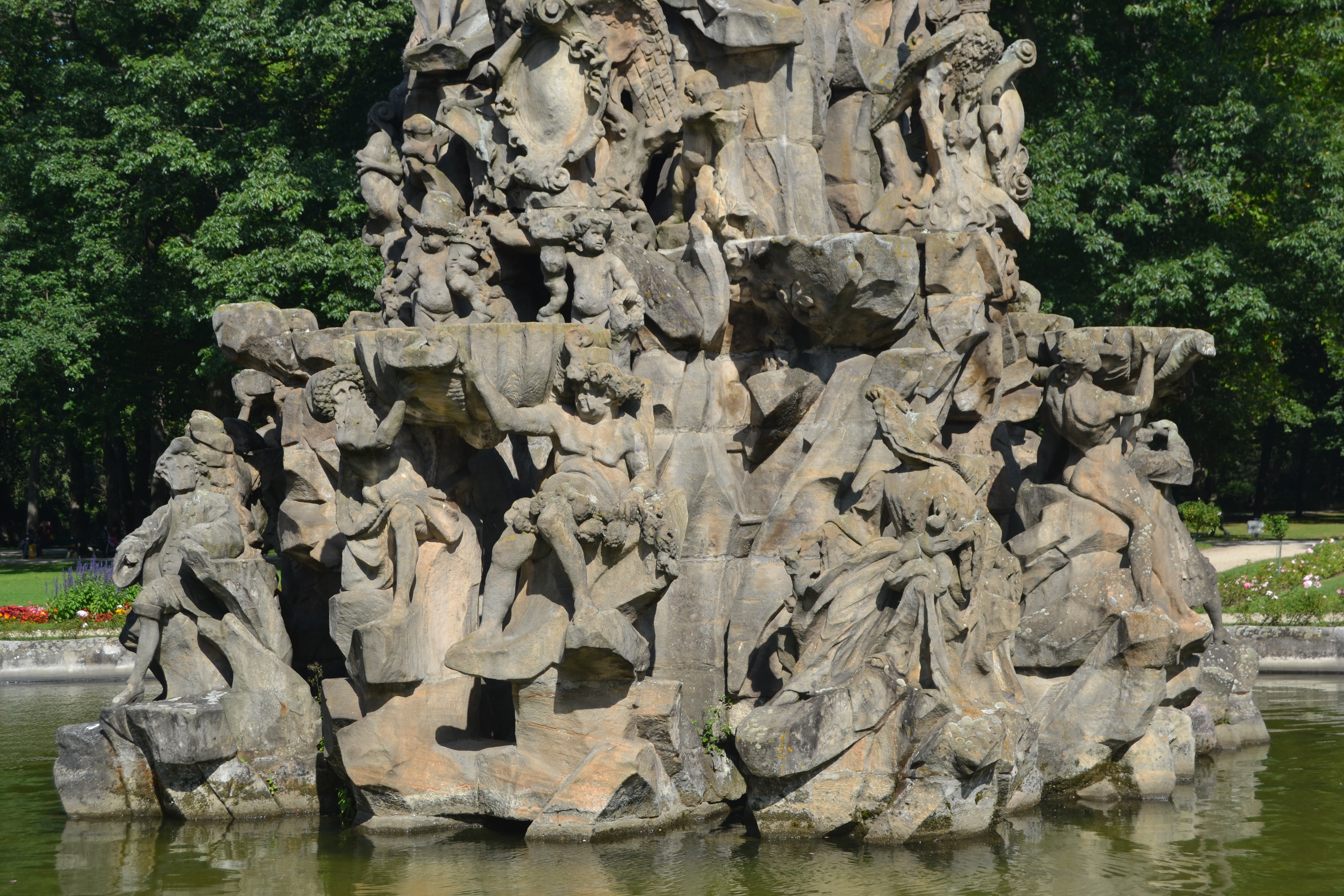 Hugenottenbrunnen Erlangen, vom Schloss aus aufgenommen, Westansicht, Detail unten